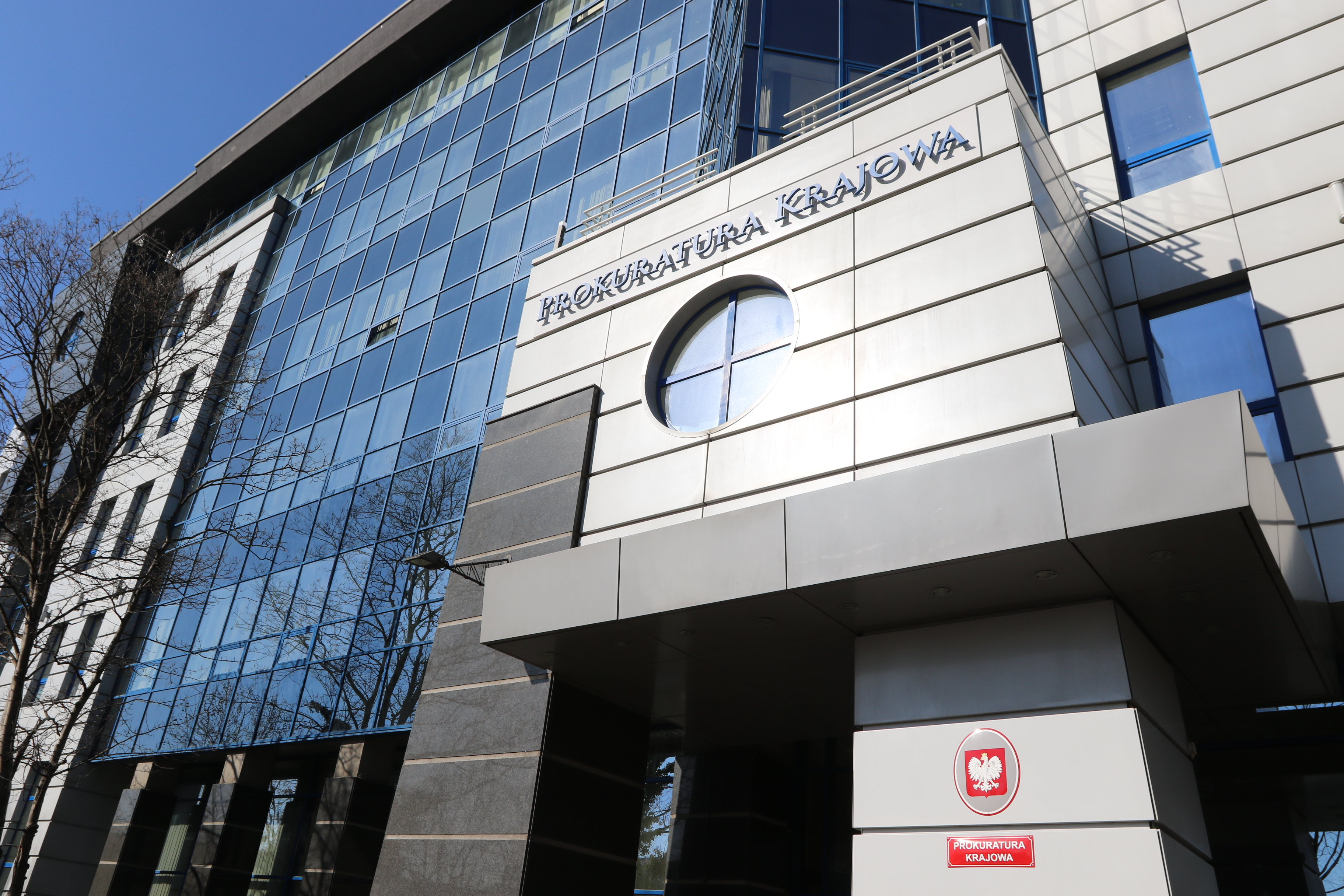 siedziba Prokuratura Krajowej przy ul. Postępu 3